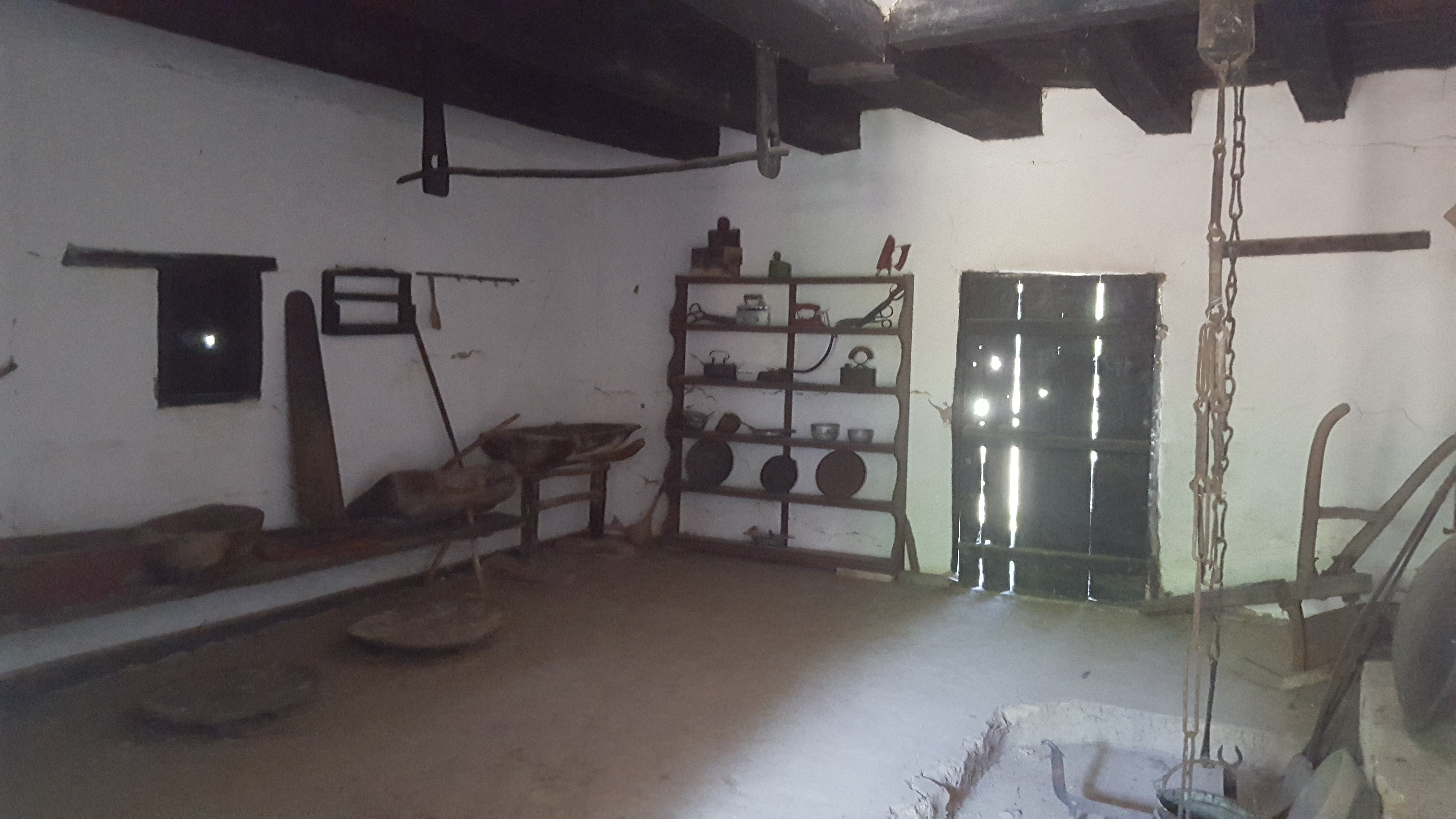 Odžaklija Matića kuće u Vraniću